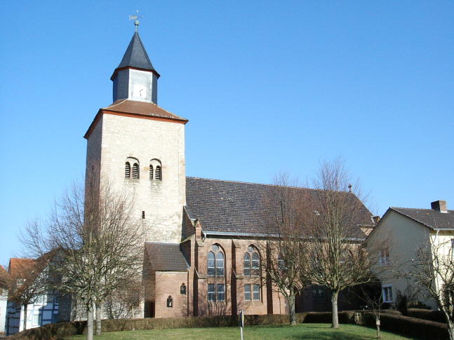 Die Kirche von Westuffeln, aufgenommen von Christian Mische. Die Kirche von Westuffeln ist ein wichtiges Symbol für die Identität der Einwohner des Dorfes in Nordhessen. Sie wird oft für die Darstellung des Dorfes verwendet, auch dann, wenn es sich nicht um religiöse Anlässe handelt.